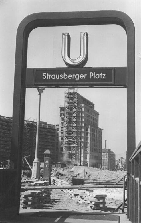 Zentralbild Krueger 7.9.1953 Von den Bauarbeiten in Berlin (Stand der Bauarbeiten am 31.8.1953). Die Ausbauarbeiten am Hochhaus A-Süd am Strausberger Platz, Berlin, sind zu 50,7% durchgeführt.